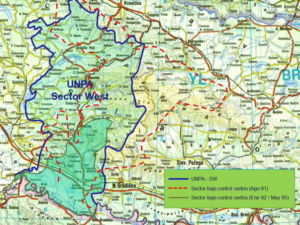 Confeccionado sobre la base de: Jakša, Raguž, (2015-12-27). «Ustrojavanje i raspad teritorijalne obrane Srpske autonomne oblasti (SAO) Zapadne Slavonije 1991. Godine (disponible en Zbornik Janković (en croata). ISSN 1849-6873. Consultado el 2018-09-24. Commander of Staff of TO of Western Slavonija (1991-10-16). «Report of TO Staff of Western Slavonija to Ministry of Defense of the Republic of Serbia». ICTY ET 0029-3475-0029-3477 (en inglés). «Declaración de Dzuro Motovina en Juicio a Slobodan Milosevic» (disponible en 2002-10-07. Consultado el 2018-09-27. Petar, Bašić; Ivica, Miškulin (2010-09-29). «The chronicles of Grubišno Polje 1990-1991 (Part II)» (disponible en Scrinia Slavonica (en croata) 10 (1). ISSN 1332-4853. Consultado el 2018-09-30. Servicio Histórico del Ejército. El Ejército Argentino y las Operaciones de Mantenimiento de la Paz. UNPROFOR. Volumen V. Pag 52